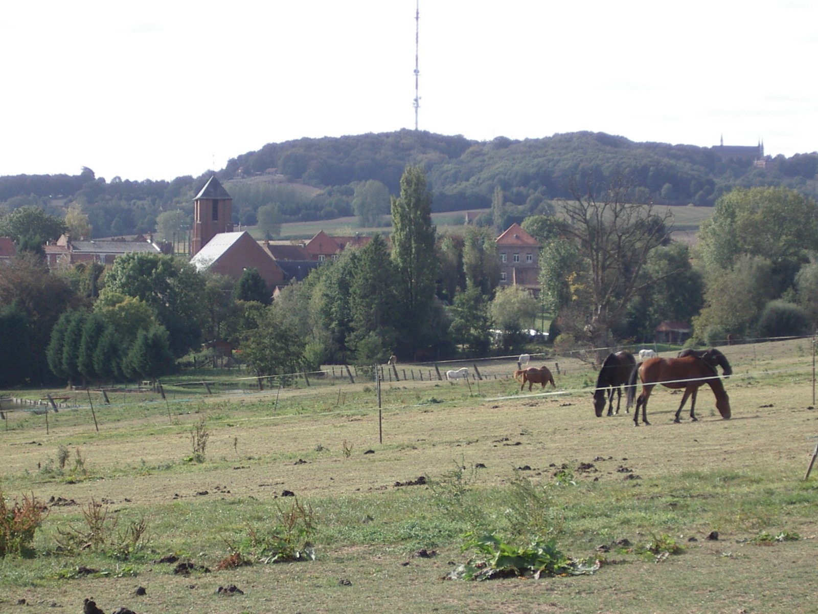 Village de Berthen (59, Nord)